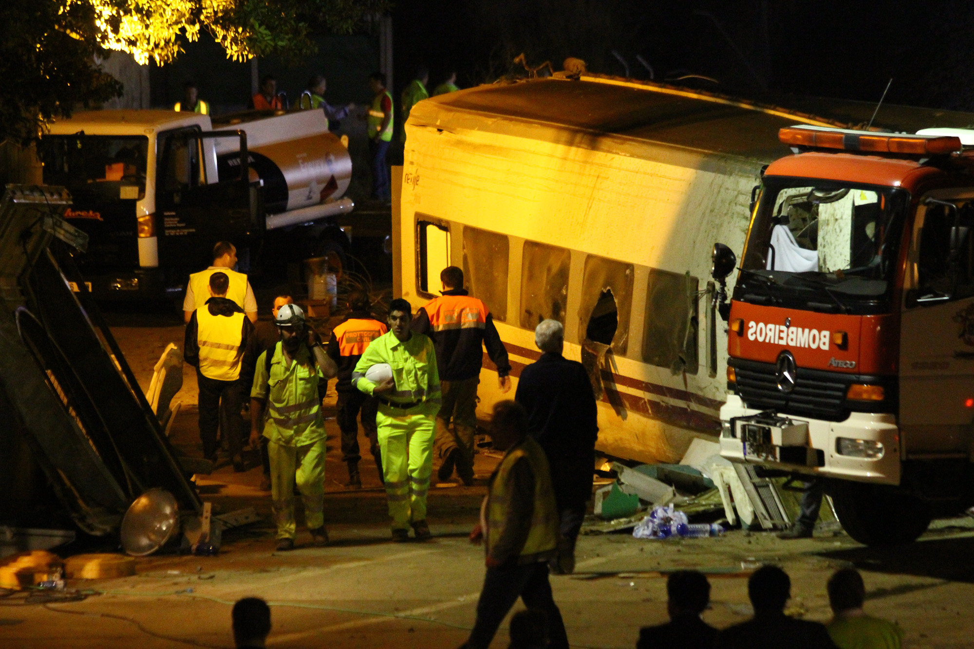 Fotos que hice in situ del accidente ferroviario ocurrido este 24 de julio cerca de Santiago de Compostela. En el momento de escribir estas líneas ya se cuentan 65 muertos. Es el peor accidente ferroviario de España en los últimos 40 años. Tragedy in Santiago de Compostela Photos I made on-site of the train crash on July 24 near Santiago de Compostela. At the time of writing are counted 65 dead. It is the worst rail accident in Spain in the last 40 years.